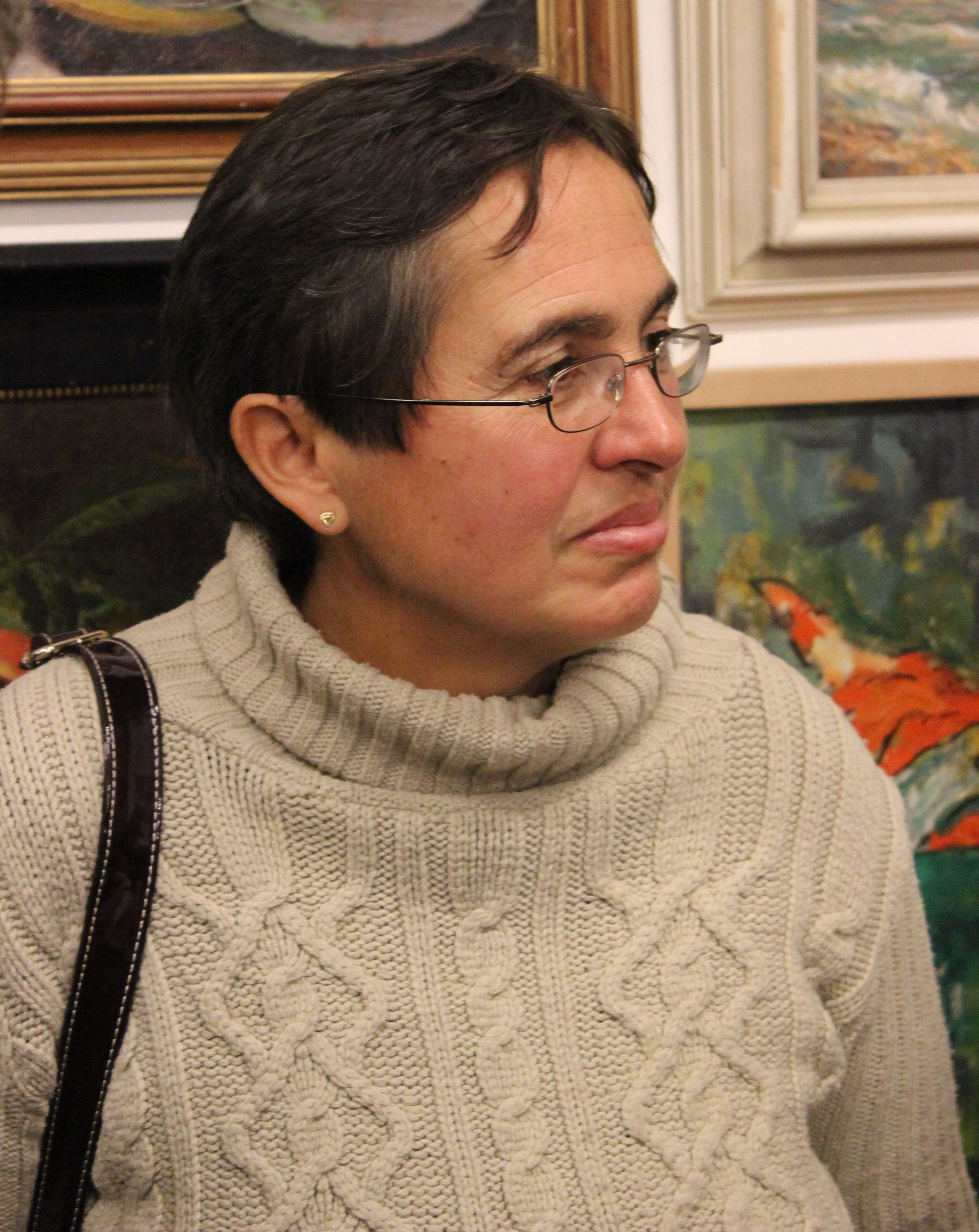 Eva Frantinová na Maxiautogramiádě konané v pražské galerii Mánesova 54 péčí Vratislava Ebra.